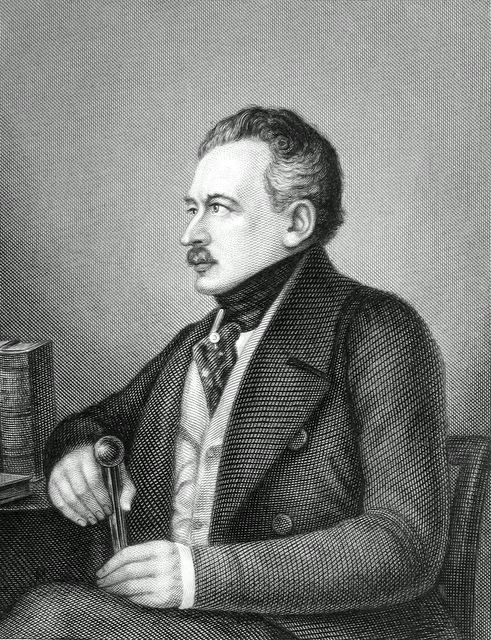 Joseph von Radowitz (1795-1853)